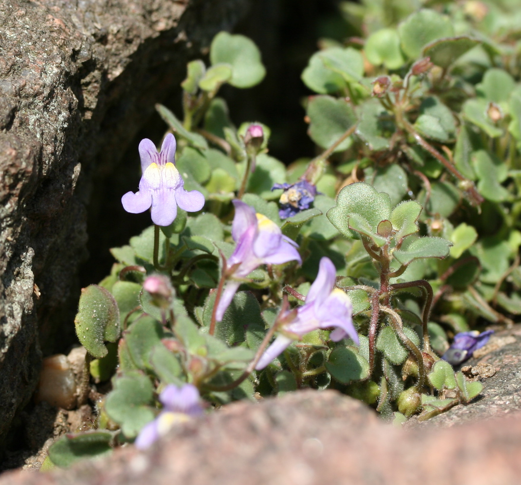 Cymbalaria pallida im Botanischen Garten Dresden